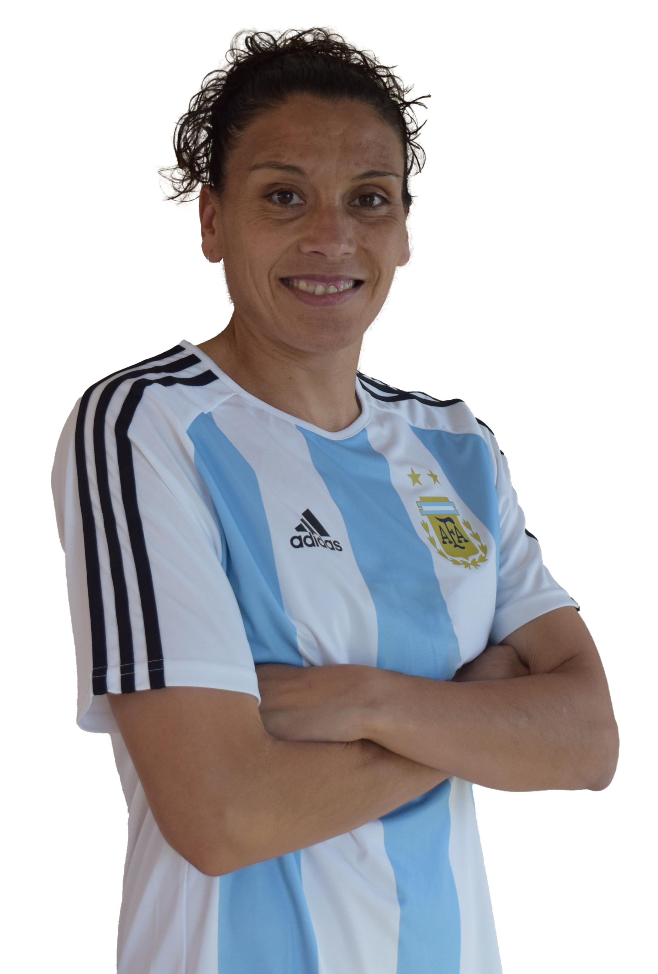 Mariela Coronel, jugadora de la selección mayor femenina de fútbol de Argentina.Foto sacada previo al primer partido del repechaje por un lugar para el mundial de futbol femenino de Francia 2019